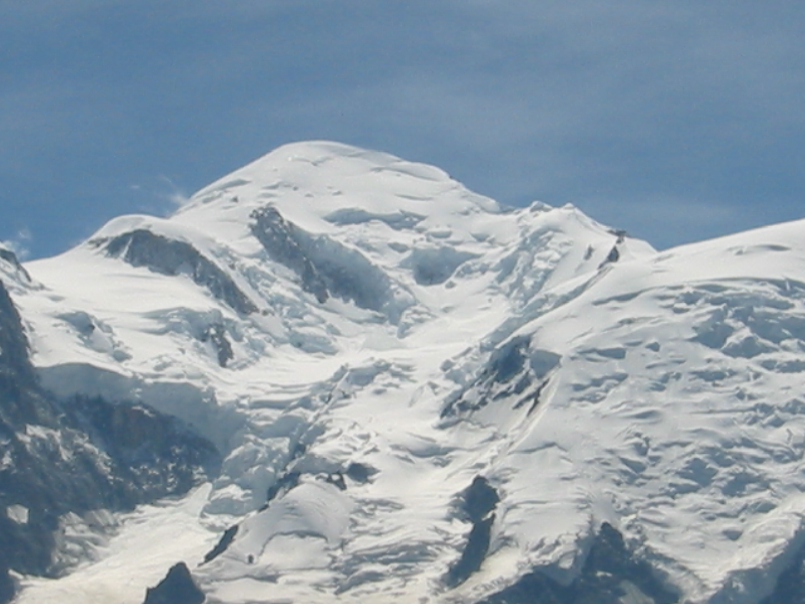 Sommet du Mont-Blanc depuis le Brévent, 2006.